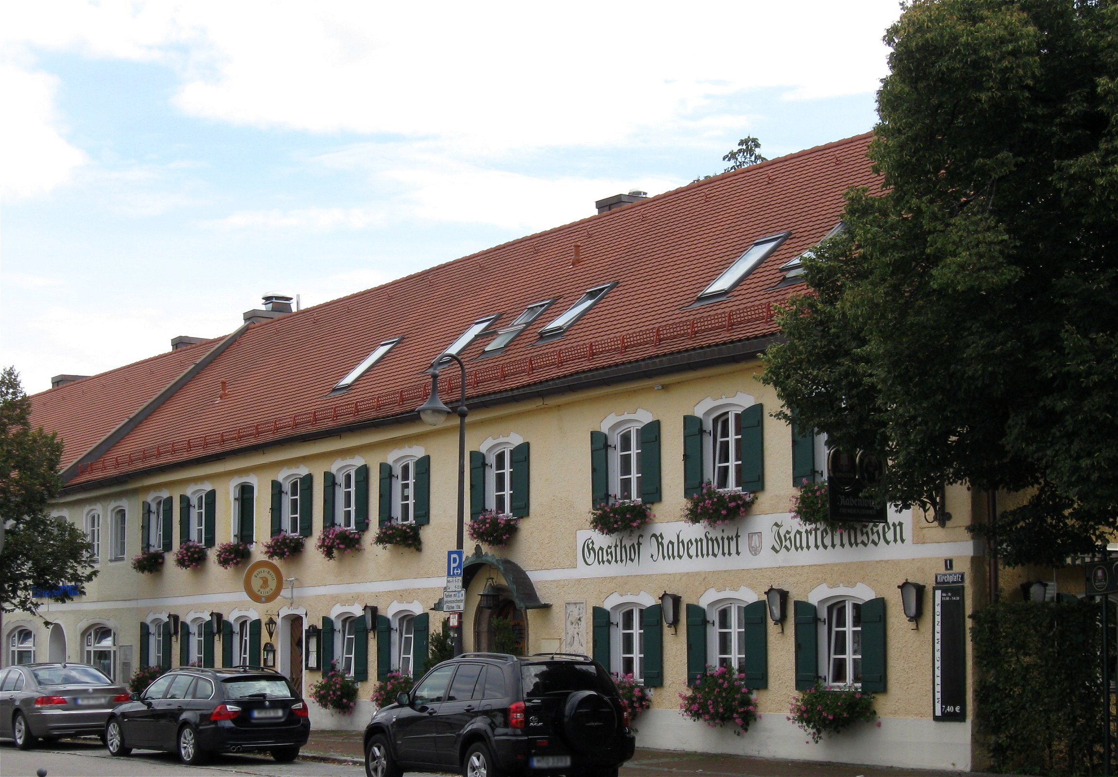 Kirchplatz 1; Gasthaus Rabenwirt, 22 Fensterachsen langer zweigeschossiger Traufseitbau von besonderer städtebaulicher Bedeutung, um 1850/60, Ausbau um 1900; zugehöriger ehem. Saalbau, mit Mansarddach, neubarock, um 1905/10, Pullach im Isartal